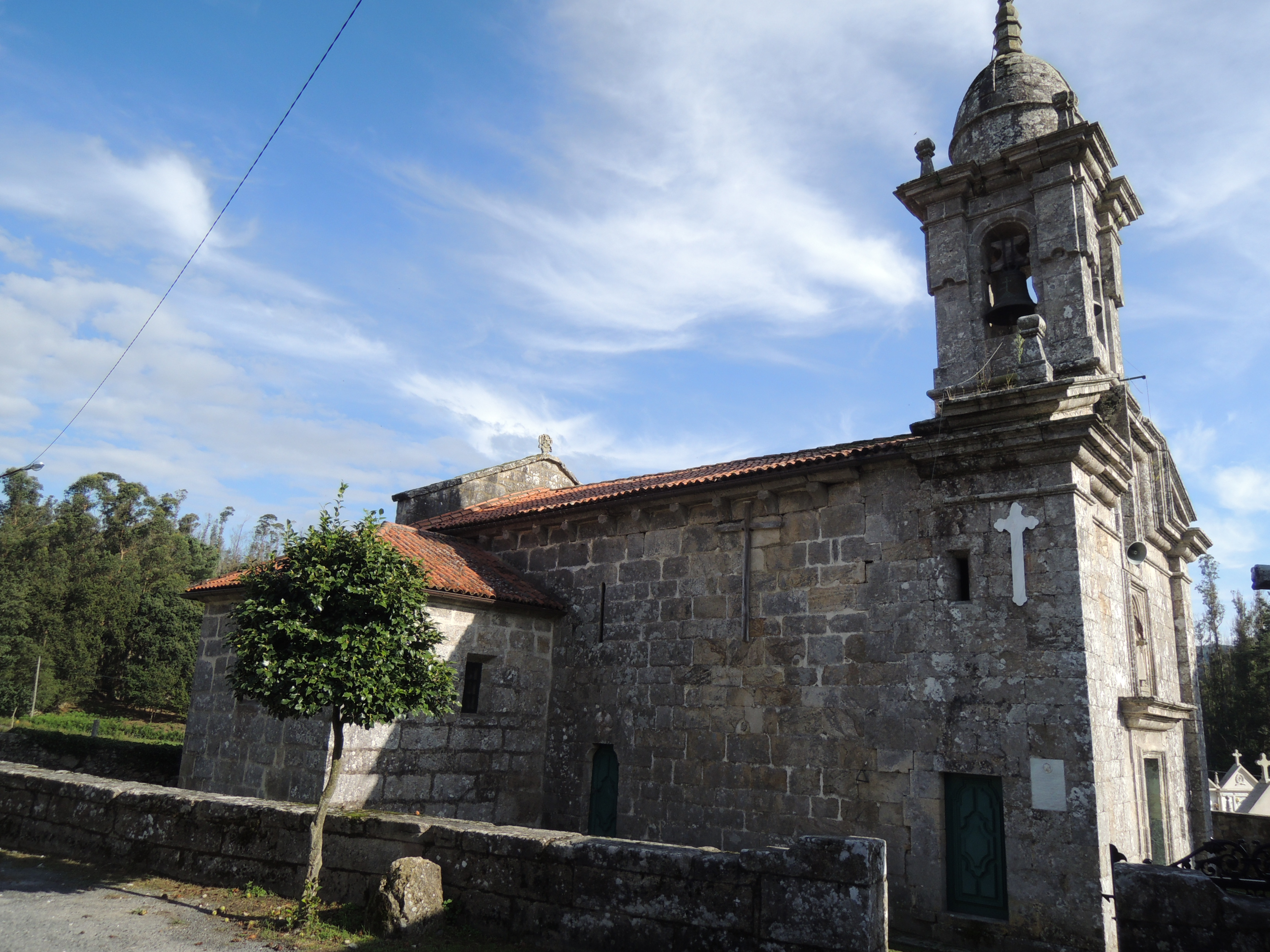 Iglesia de Santo Estevo de Oca